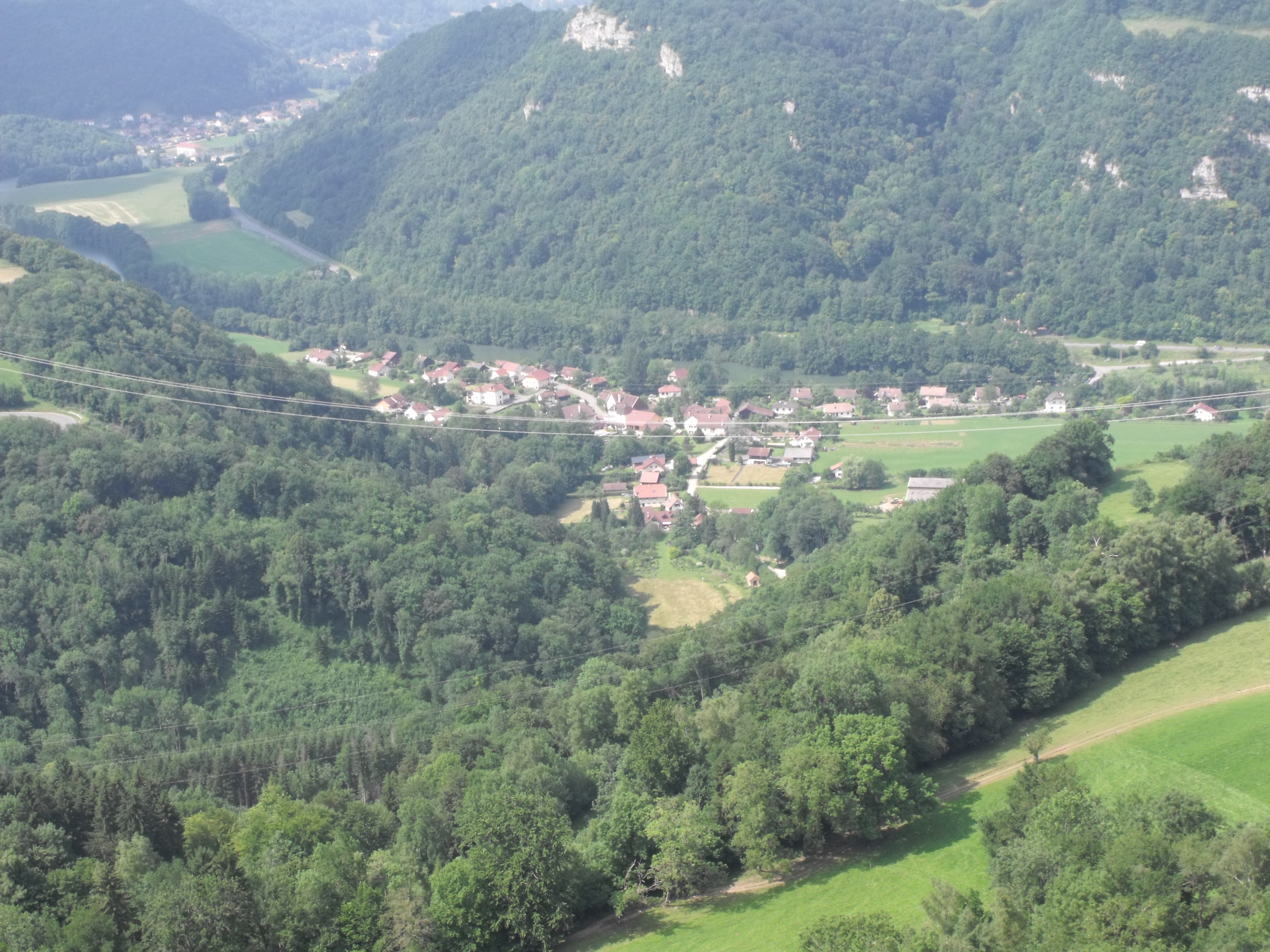 Panorame du village de Bief, Doubs, France